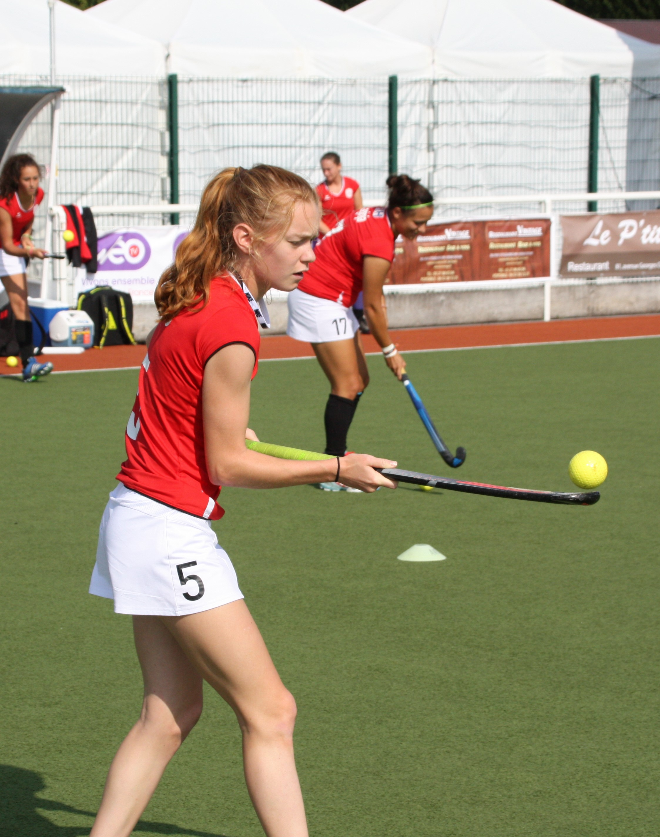 Helene Herzog bei der Hockey Worlde League 2016 in Douai